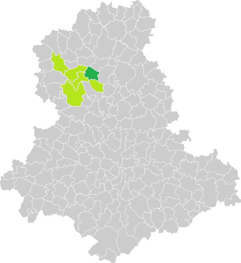 Carte de situation de la commune de Blanzac (en vert foncé) dans le votre Canton (en vert clair) sur une carte des communes de la Haute-Vienne